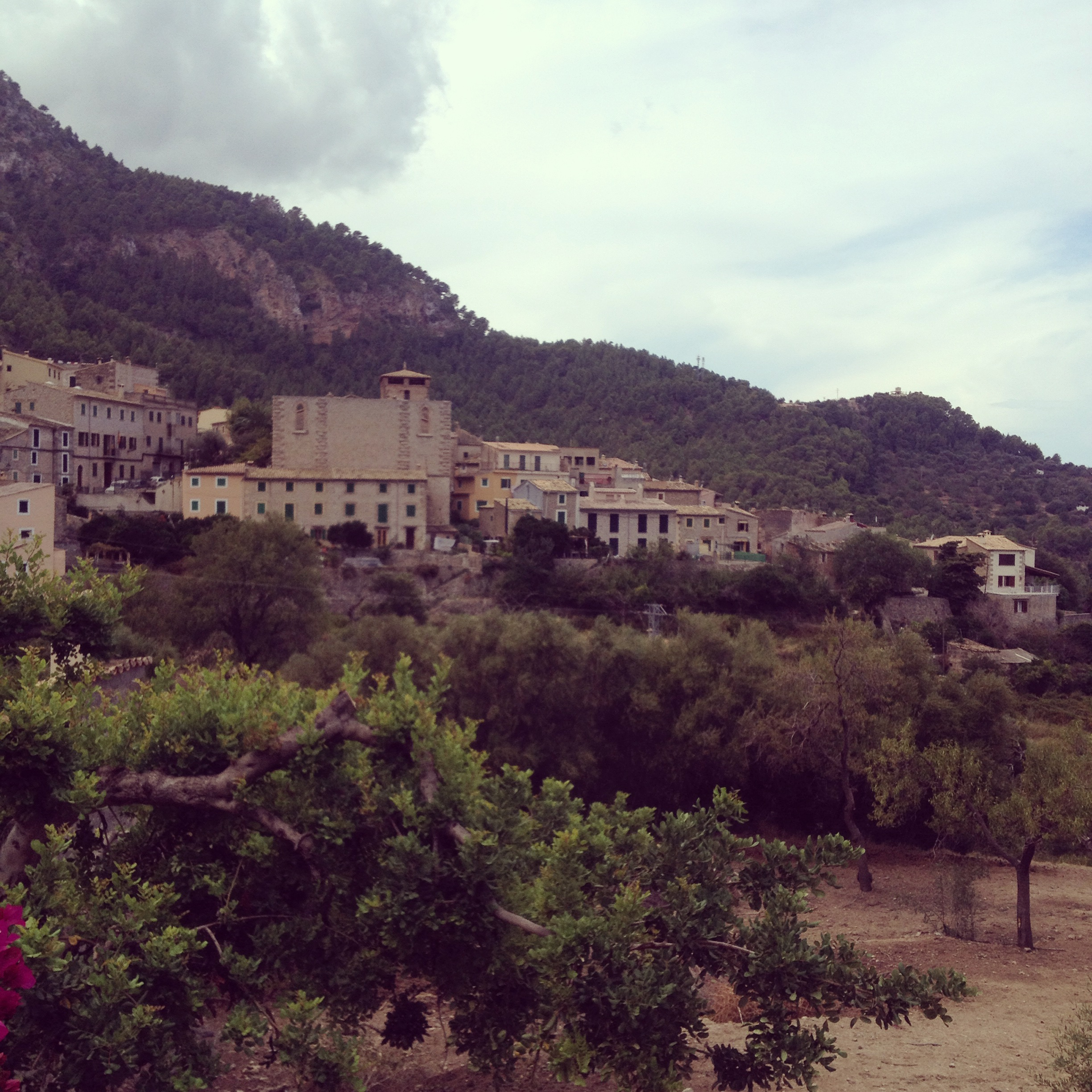 Estellencs, Mallorca.